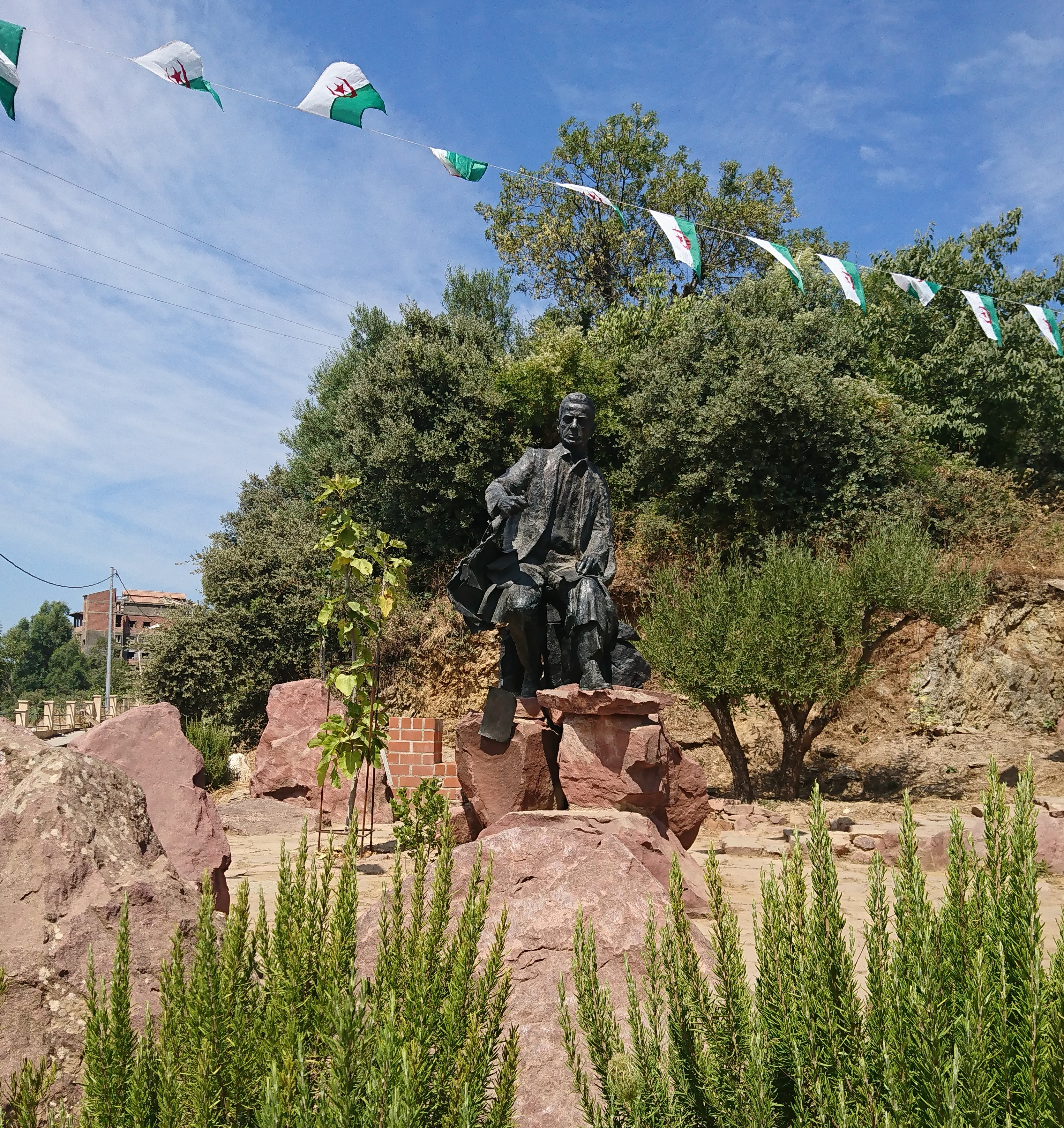 Statue de Mouloud Mammeri à Ait Yenni, village de Taourirt Mimoun Oeuvre de Olivier Graine